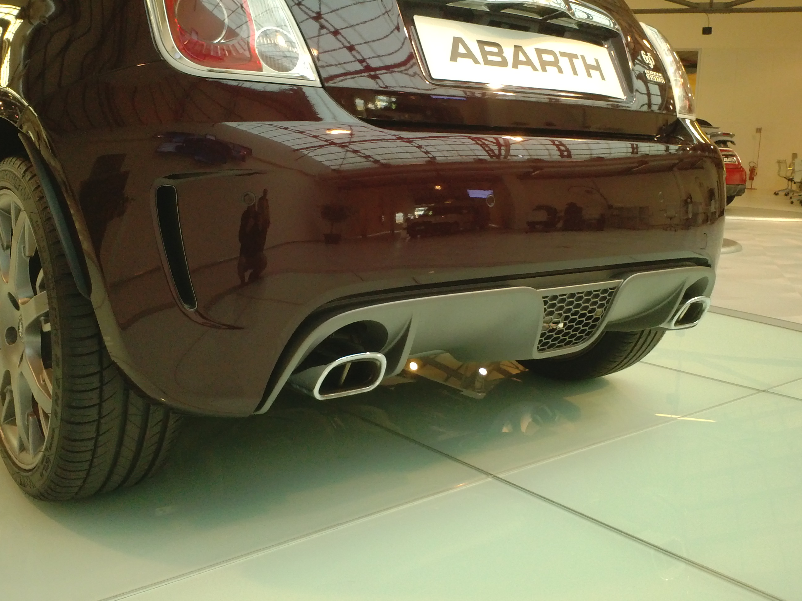 Abarth 695 Edizione Maserati - Scarichi Record Modena